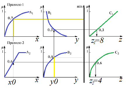 Алгоритм Цукамото